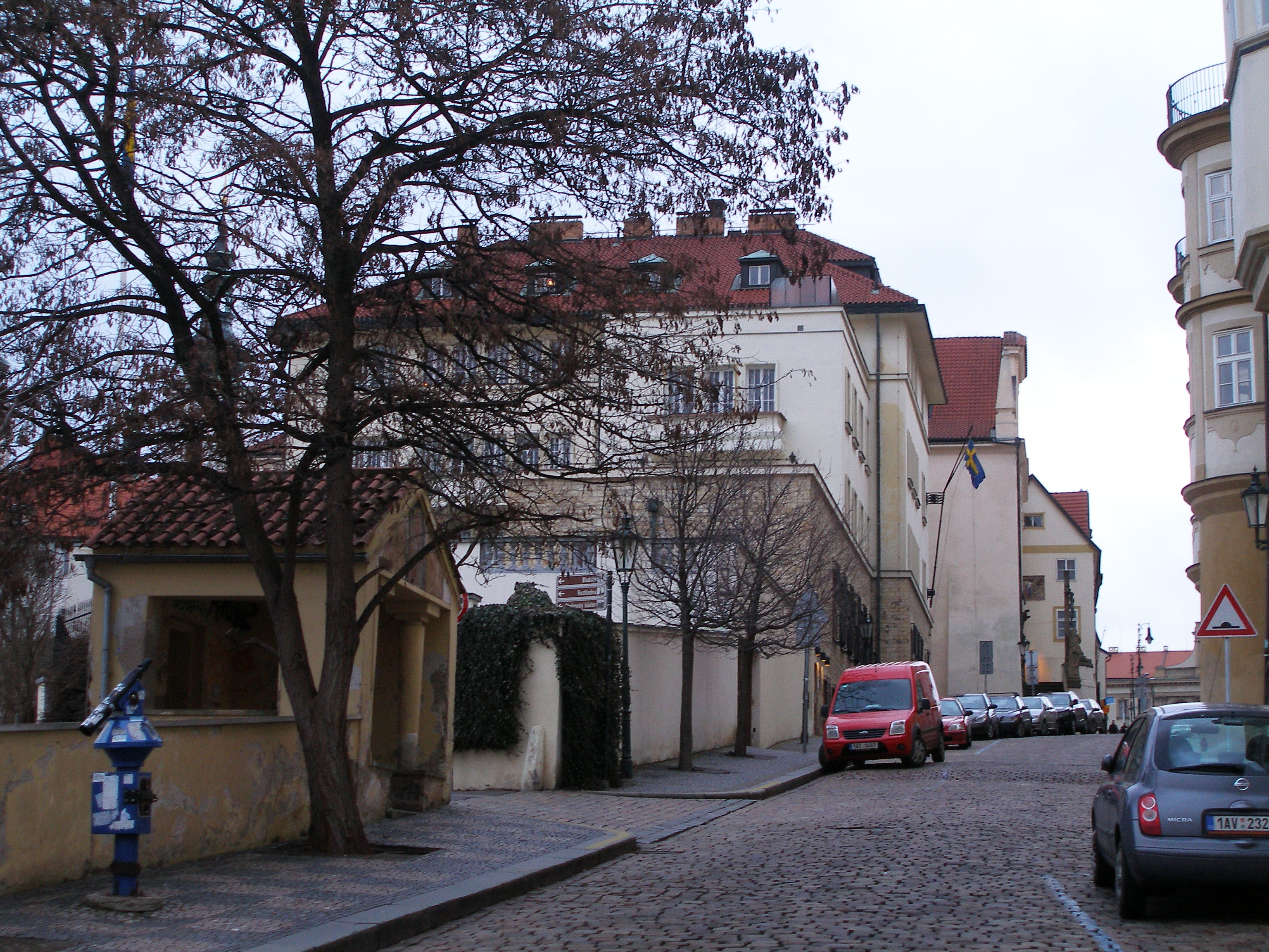 Praha, Úvoz 156/13, dnes švédská ambasáda, dříve i bydliště Elišky Junkové